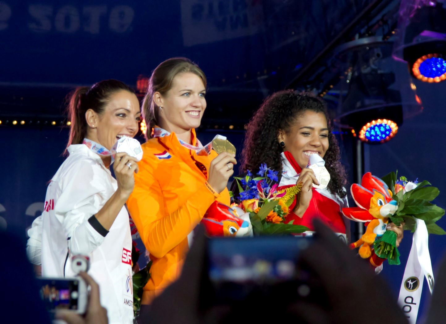 660 podium 100 m dames